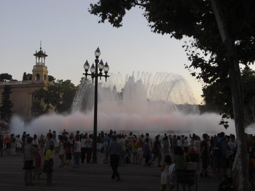 Fuentes de Montjuic